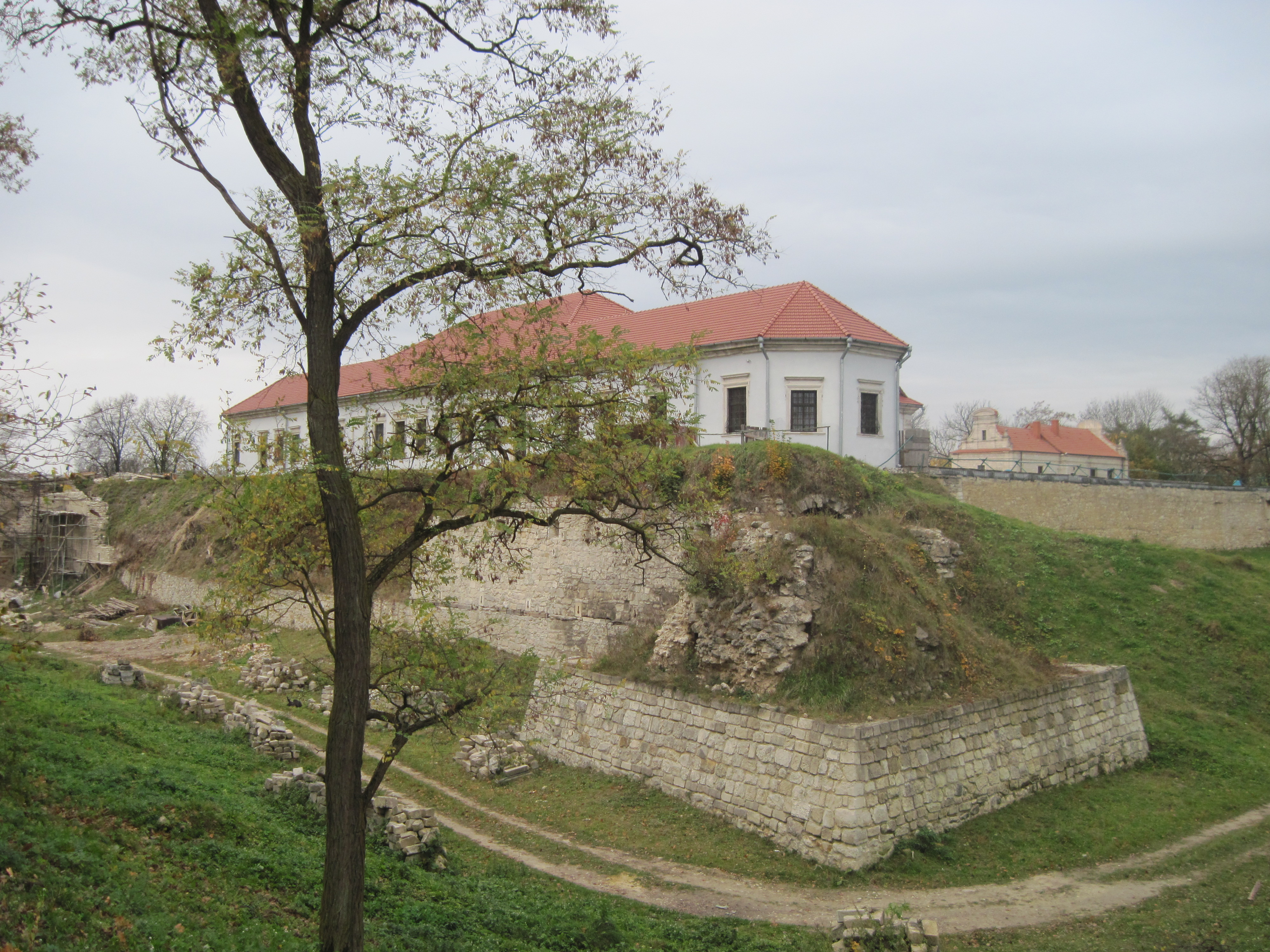 Збаразький замок 1